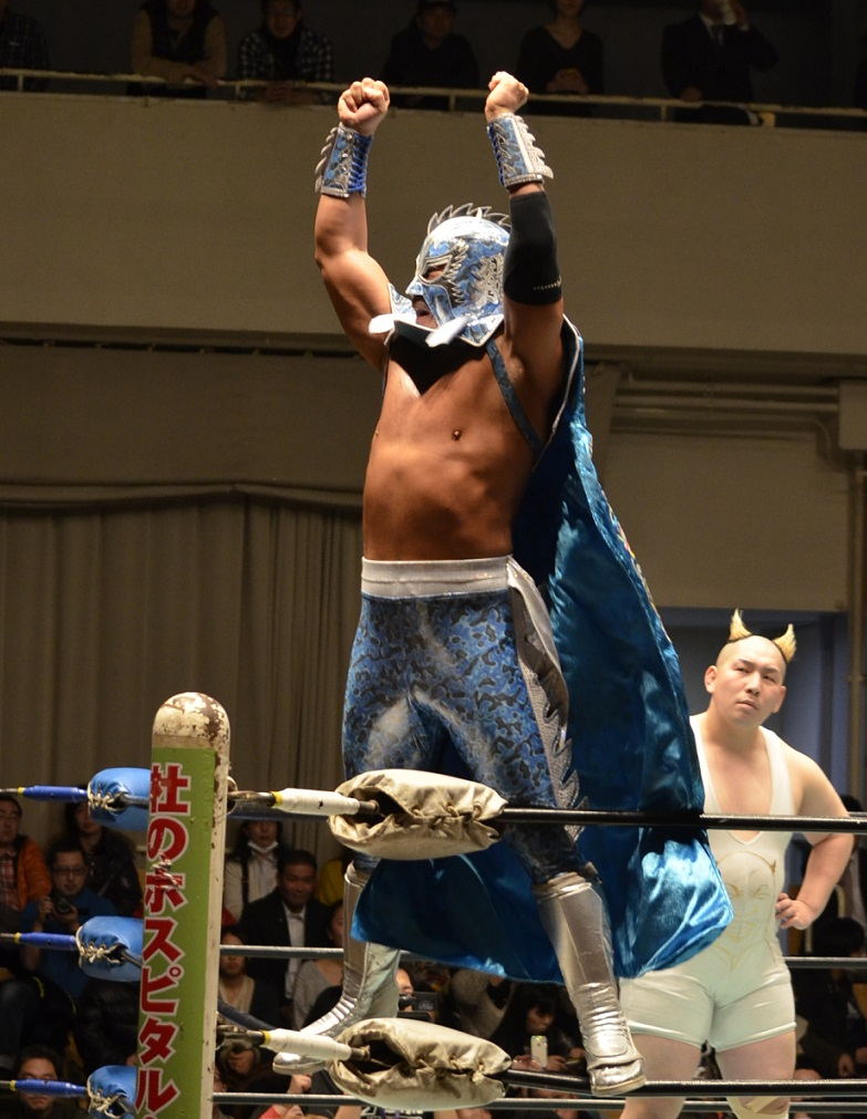 ウルティモ・ドラゴン